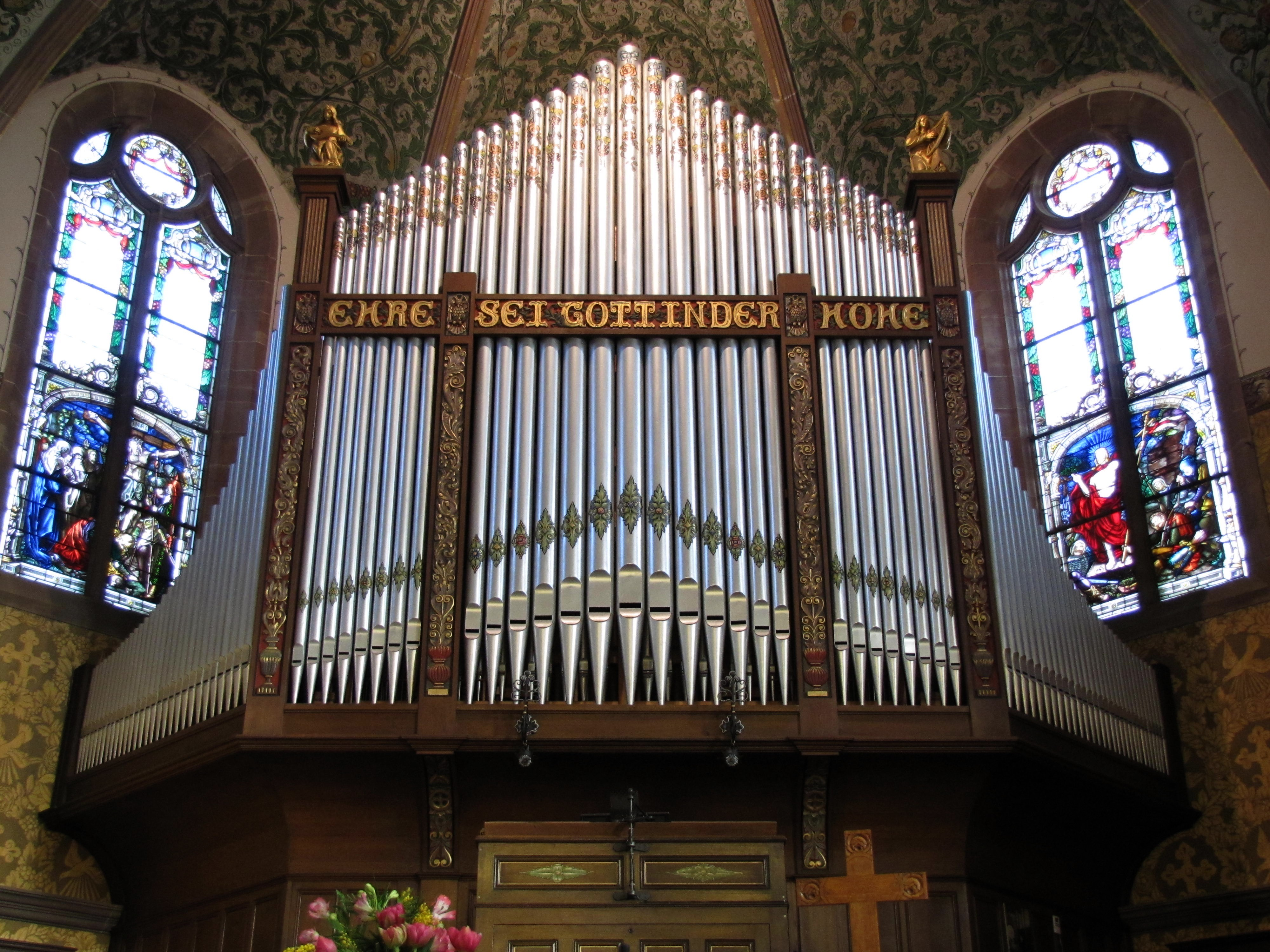 Alsace, Bas-Rhin, Église protestante Saint-Sauveur de Strasbourg-Cronenbourg, rue Jacob. Orgue Dalstein-Haerpfer (1907): This object is classé Monument Historique in the base Palissy, database of the French furniture patrimony of the French ministry of culture, under the references PM67001127 and instrument PM67000386 instrument.